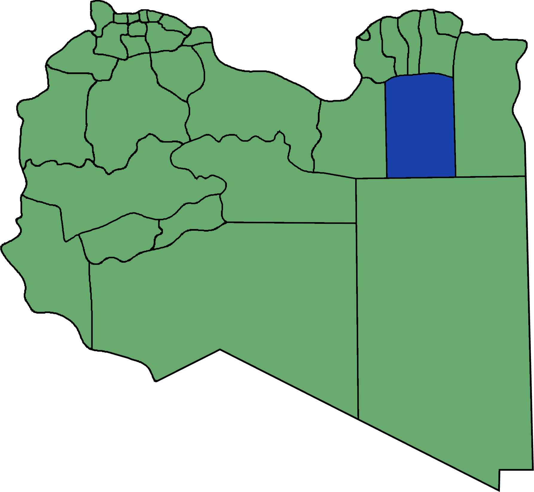 Die neuen Gemeinden (Munizipien) in Libyen. ... hervorgehoben.